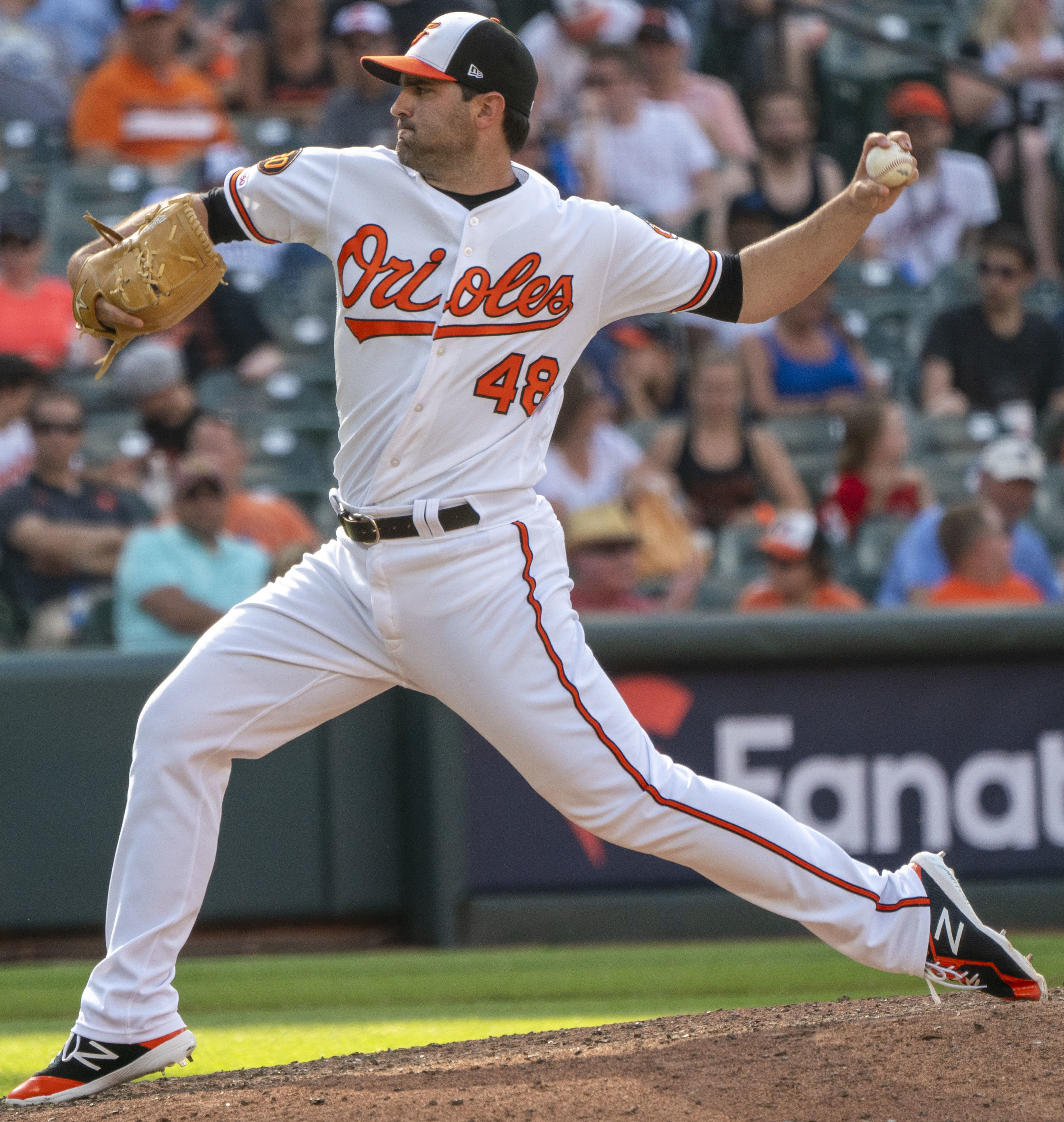 Padres at Orioles 6/26/19